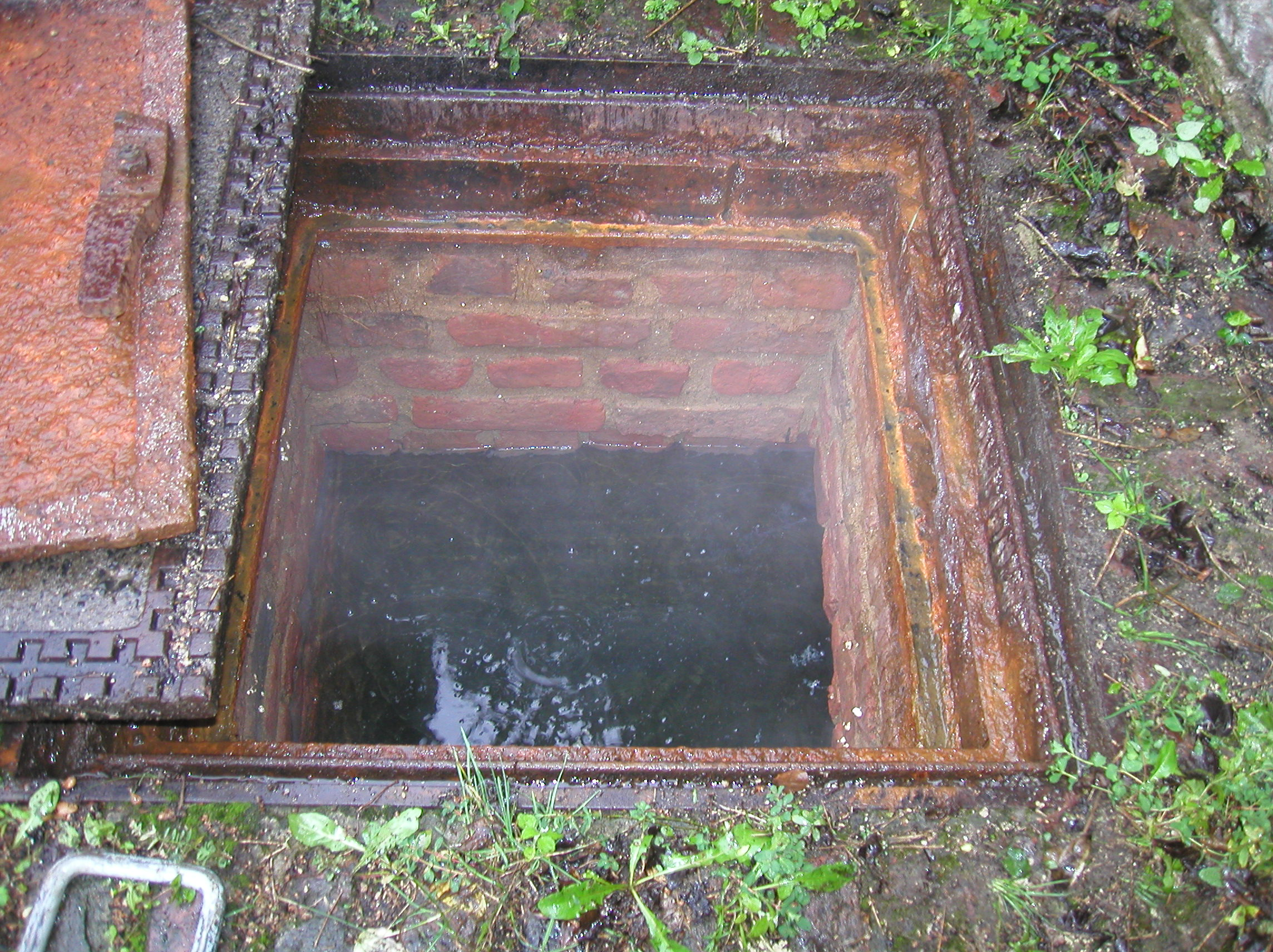 gemauerte Quellfassung der Thermalquelle "Schlangenquellchen" im Frankenberger Viertel, Aachen-Burtscheid